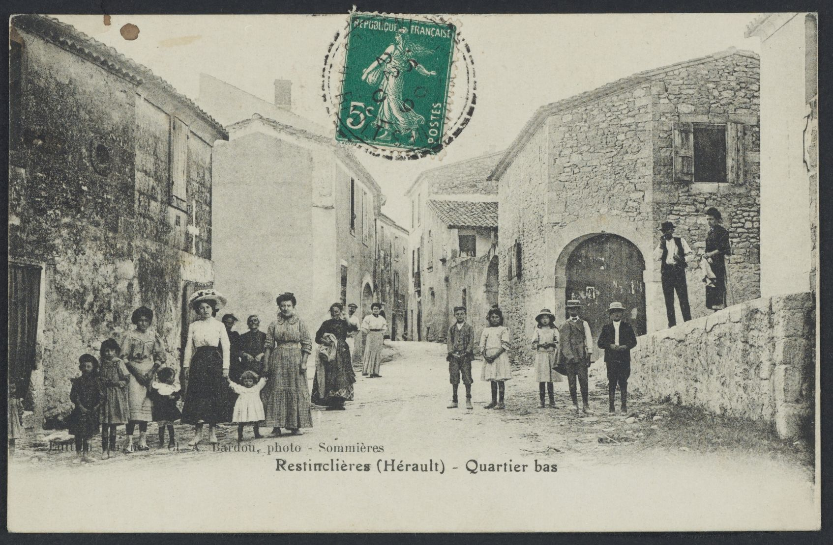 Restinclières. - Quartier bas : carte postale.